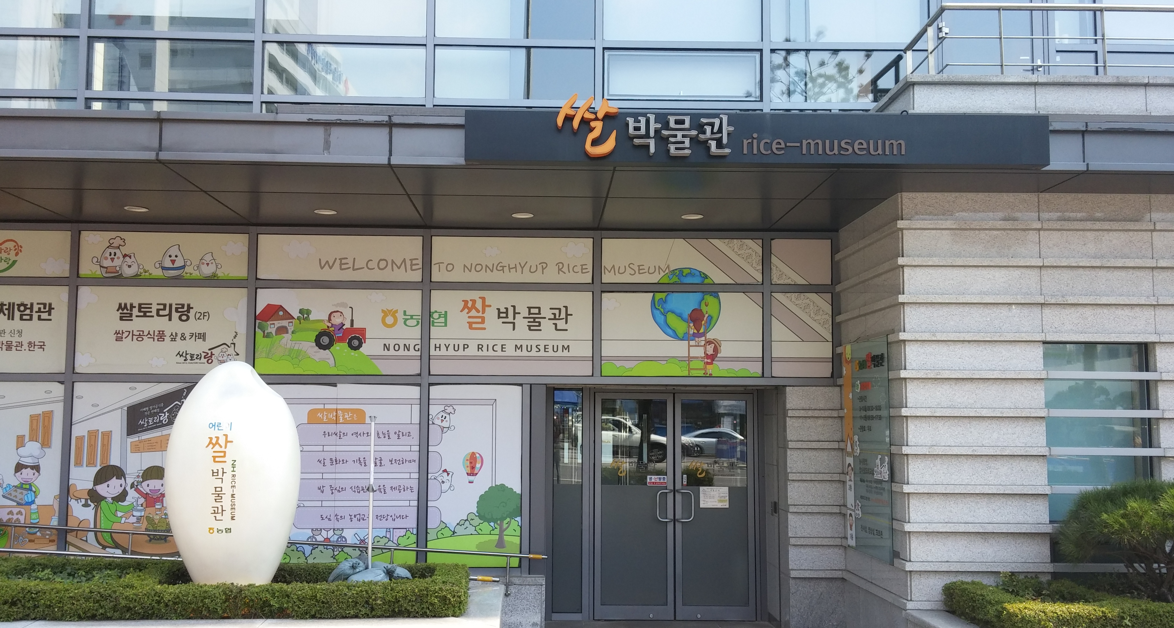 농협중앙회 쌀박물관 정문, 서울 중구 새문안로 16